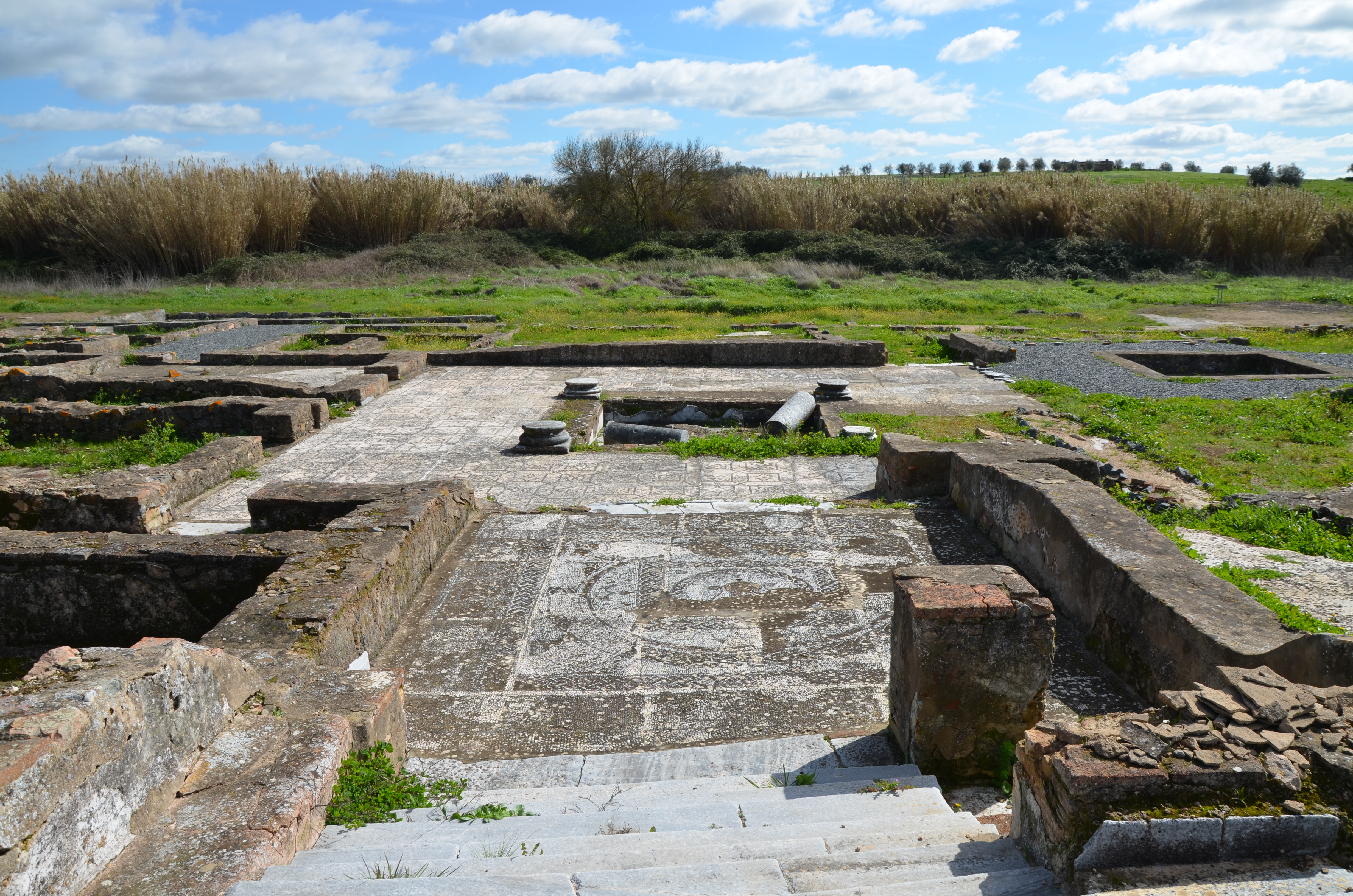 Roman Villa of Pisões, Portugal Roman villa, Pisões